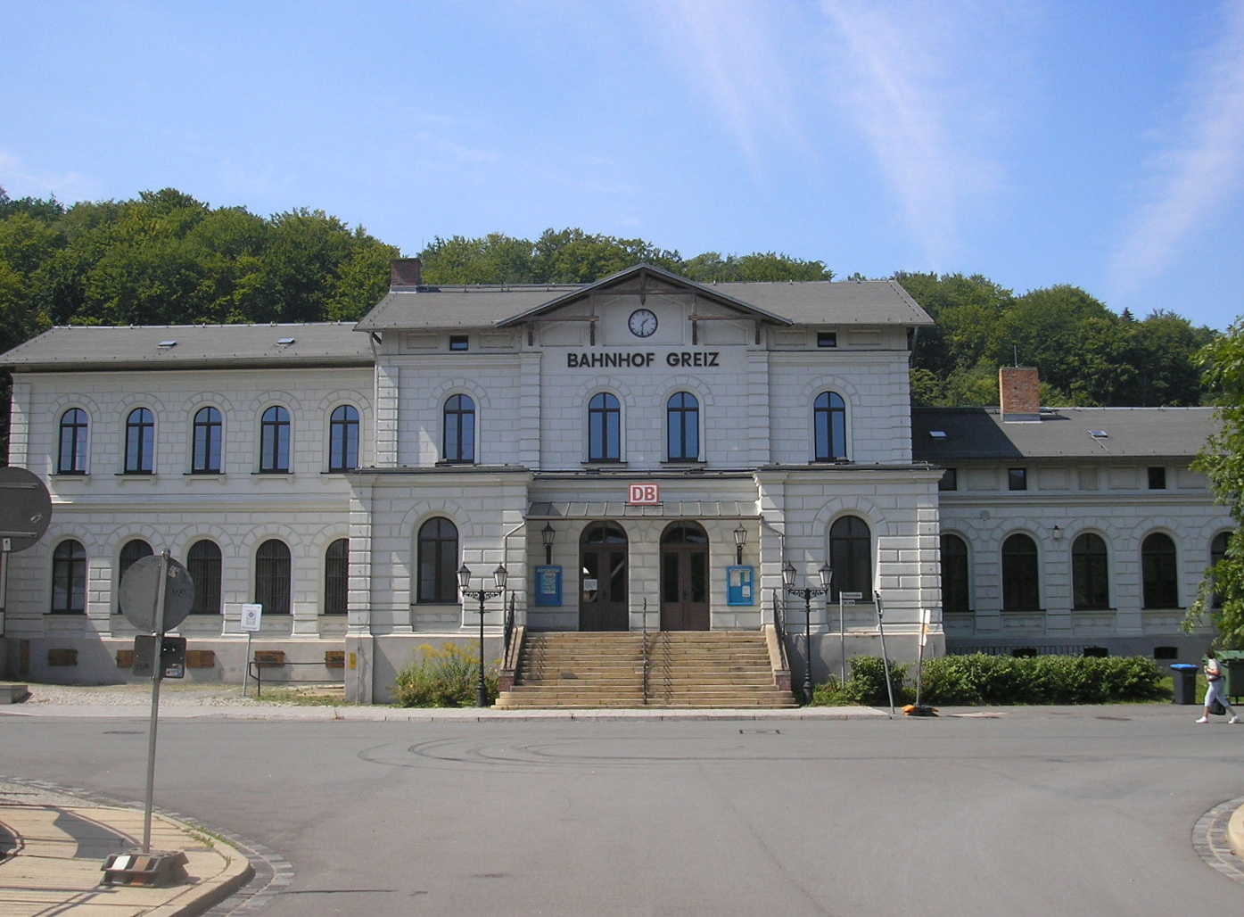 Der Bahnhof von Greiz (Thüringen).